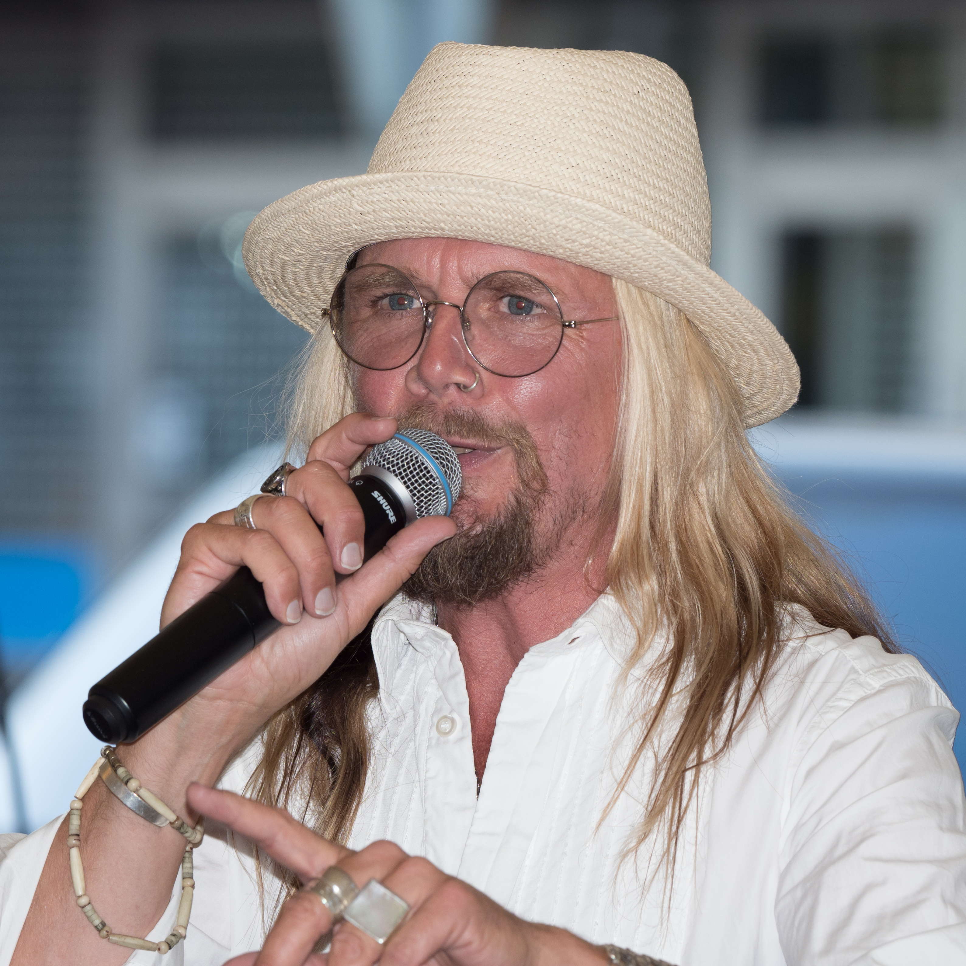 Jakob Samuelsson at Winbergs, Vaxholm, Stockholm, Sweden, July 2018